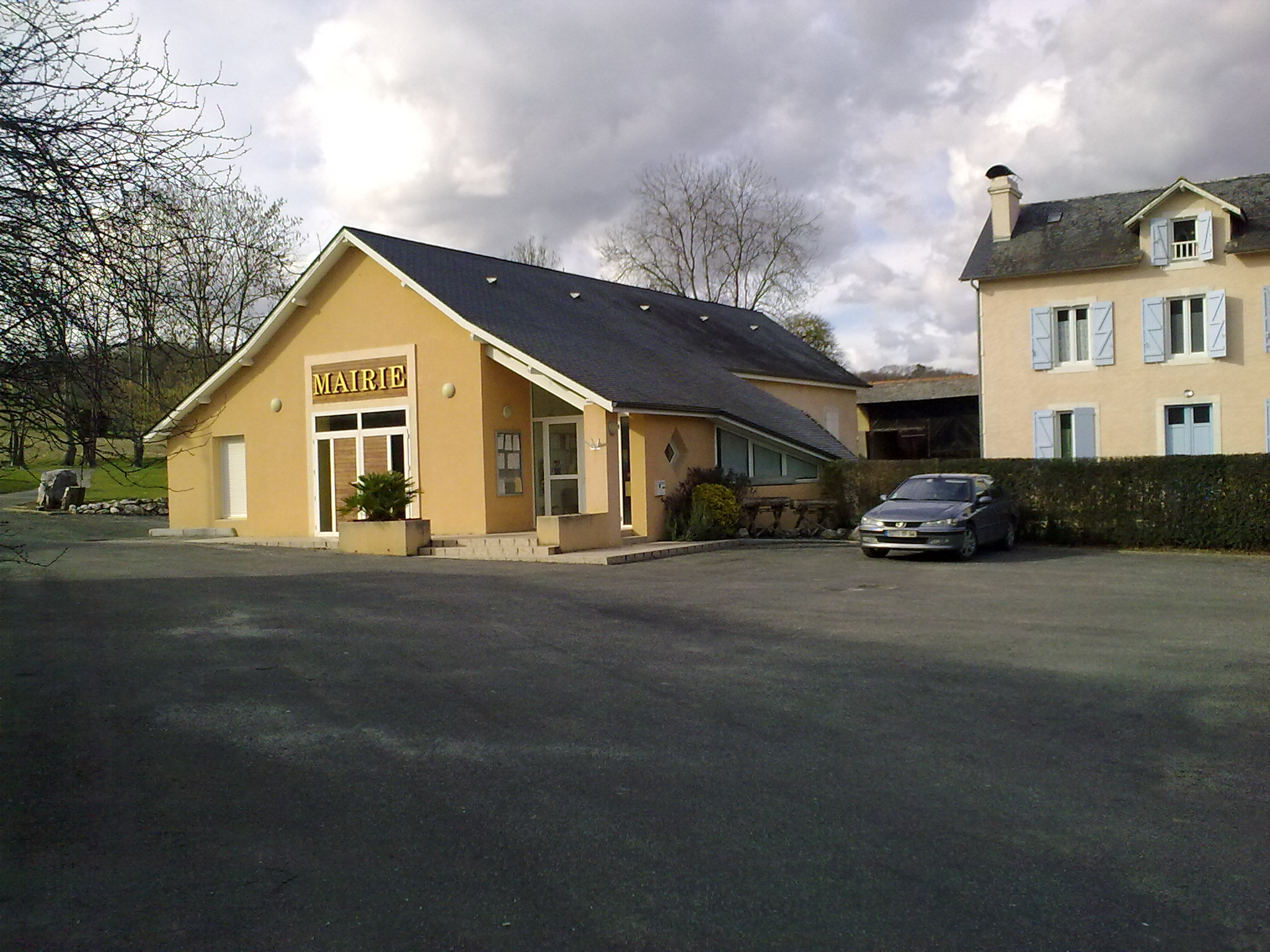 Mairie de Monassut - Audirac